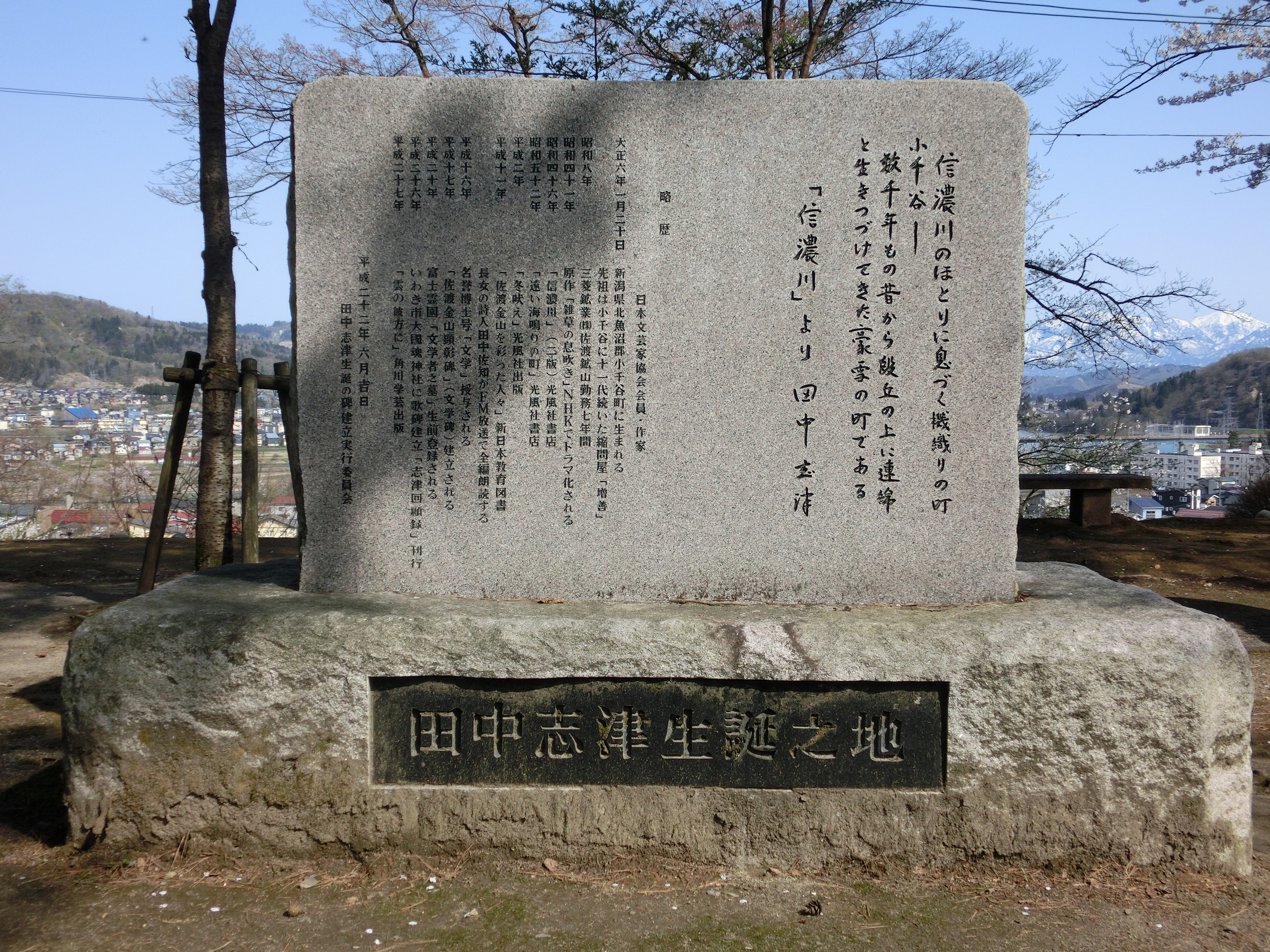 この画像は2018年4月19日投稿者自身によって新潟県小千谷市船岡山の船岡公園内にて撮影された「田中志津生誕の碑」の写真。